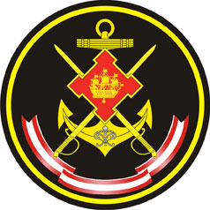 нарукавный знак ЛенВМБ